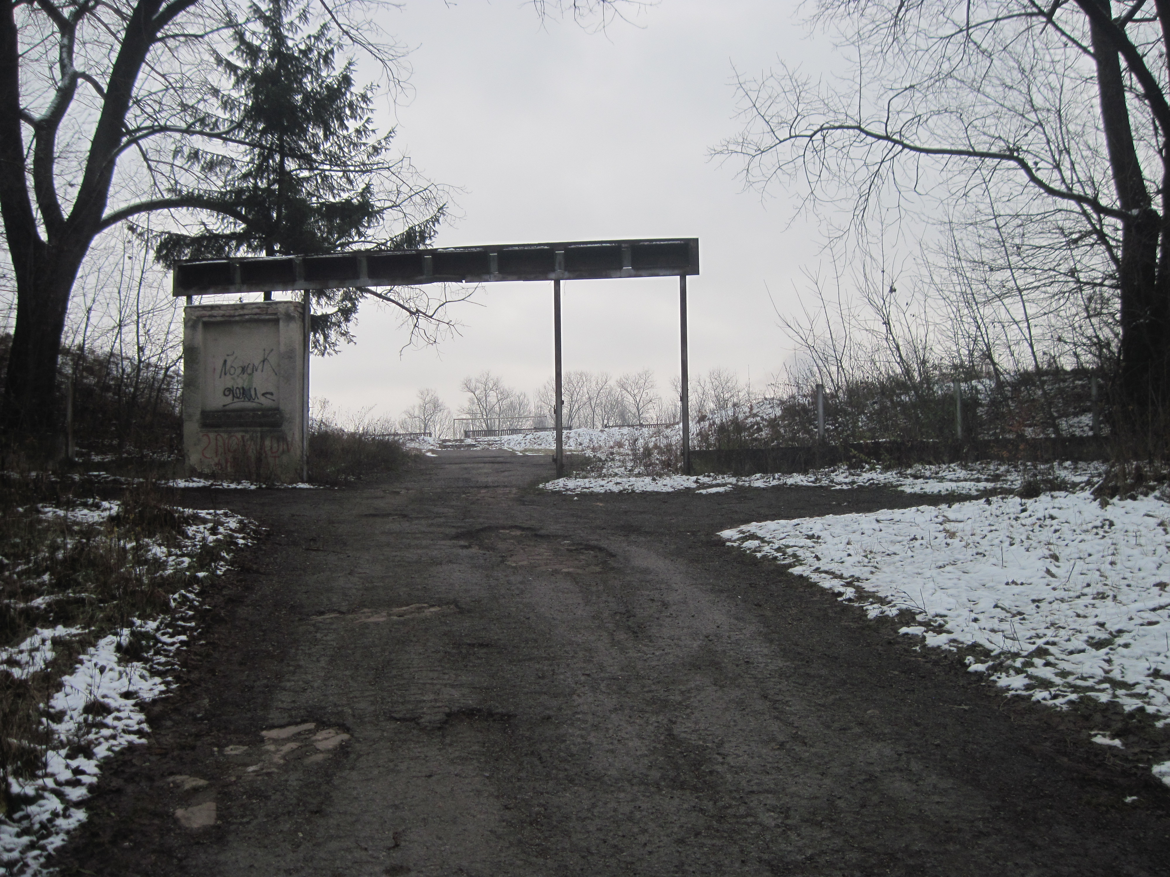 Вхід на старий стадіон Колос, Бучач, 2014